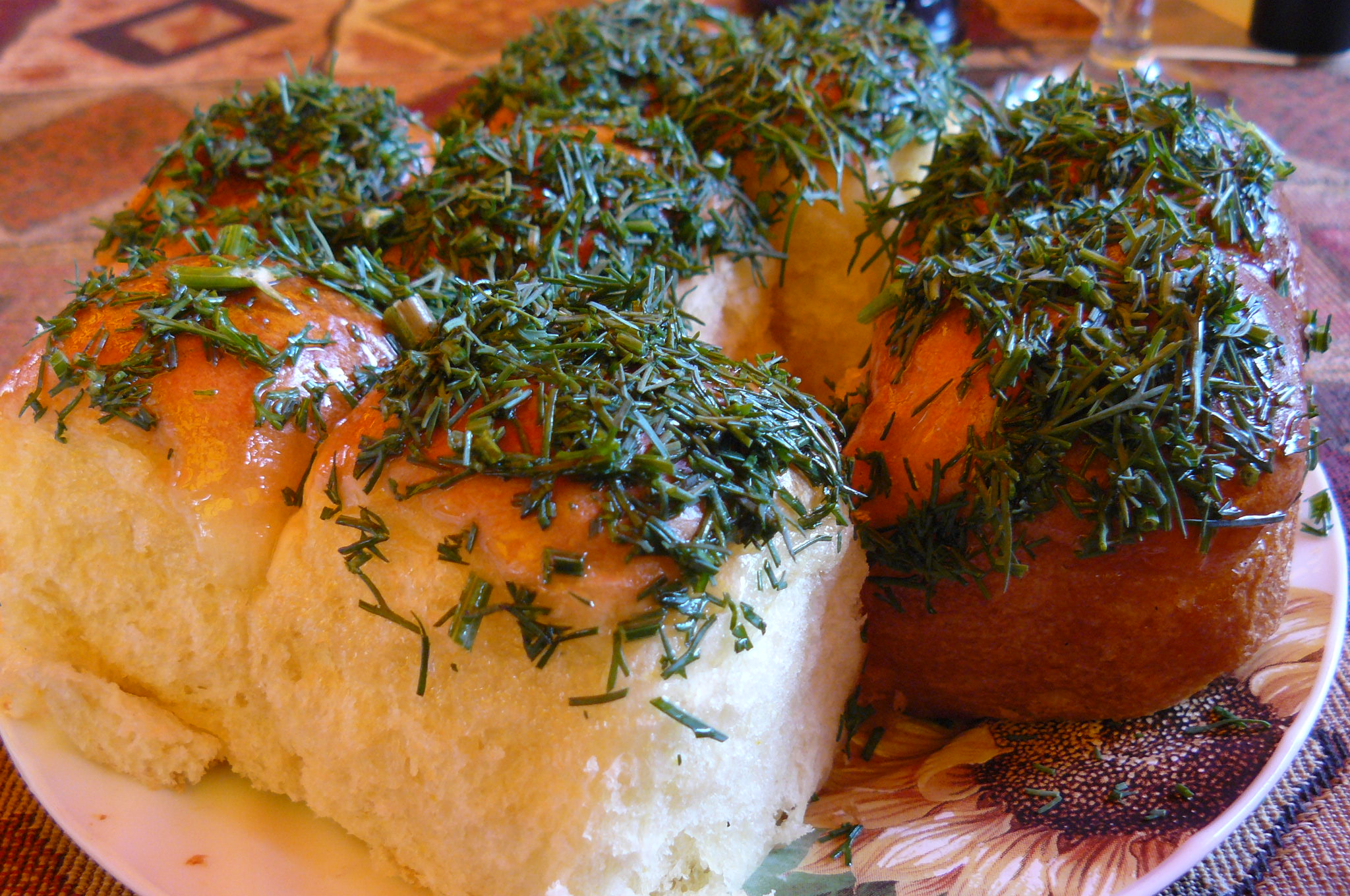 Pampuchy w Doniecku.